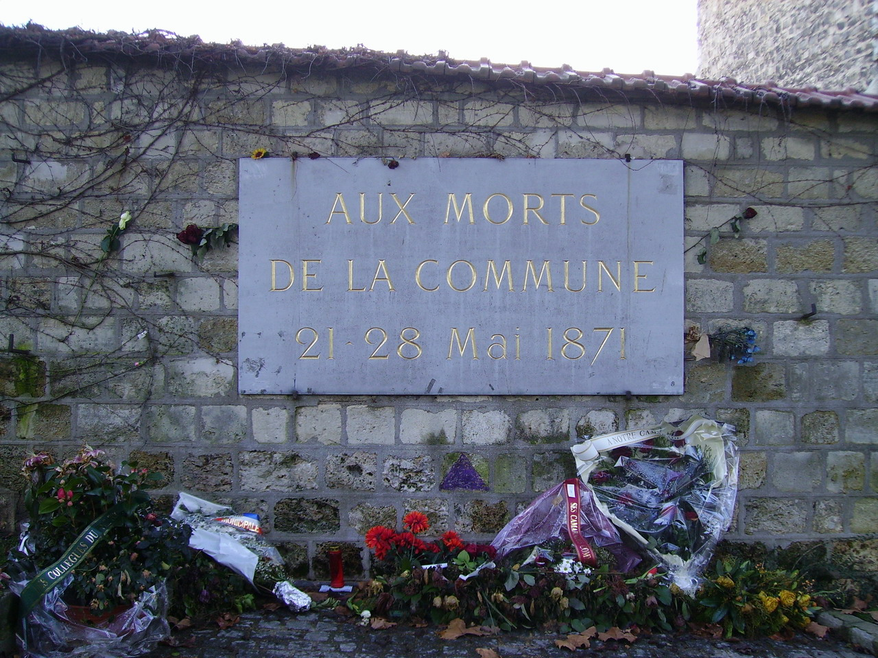 追悼碑 (ペール・ラシェーズ墓地)